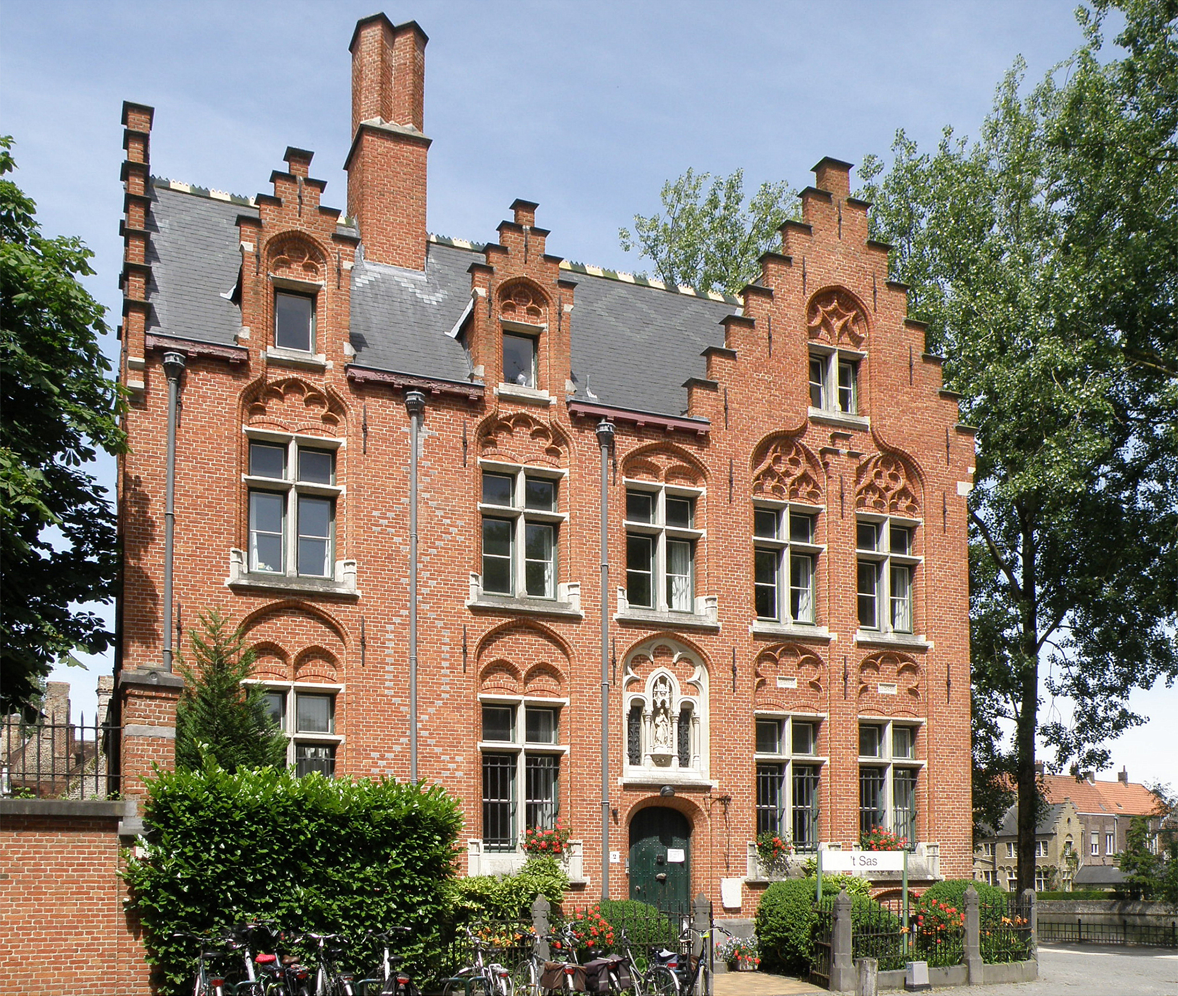 Huize Minnewater, J. Sebrechtsstraat, hoek Begijnenvest. Maakt deel uit van Minnewaterkliniek-complex. cf. Vioe: "Vrijstaand bakstenen huis, voormalige woning van de aalmoezenier van het gasthuis".